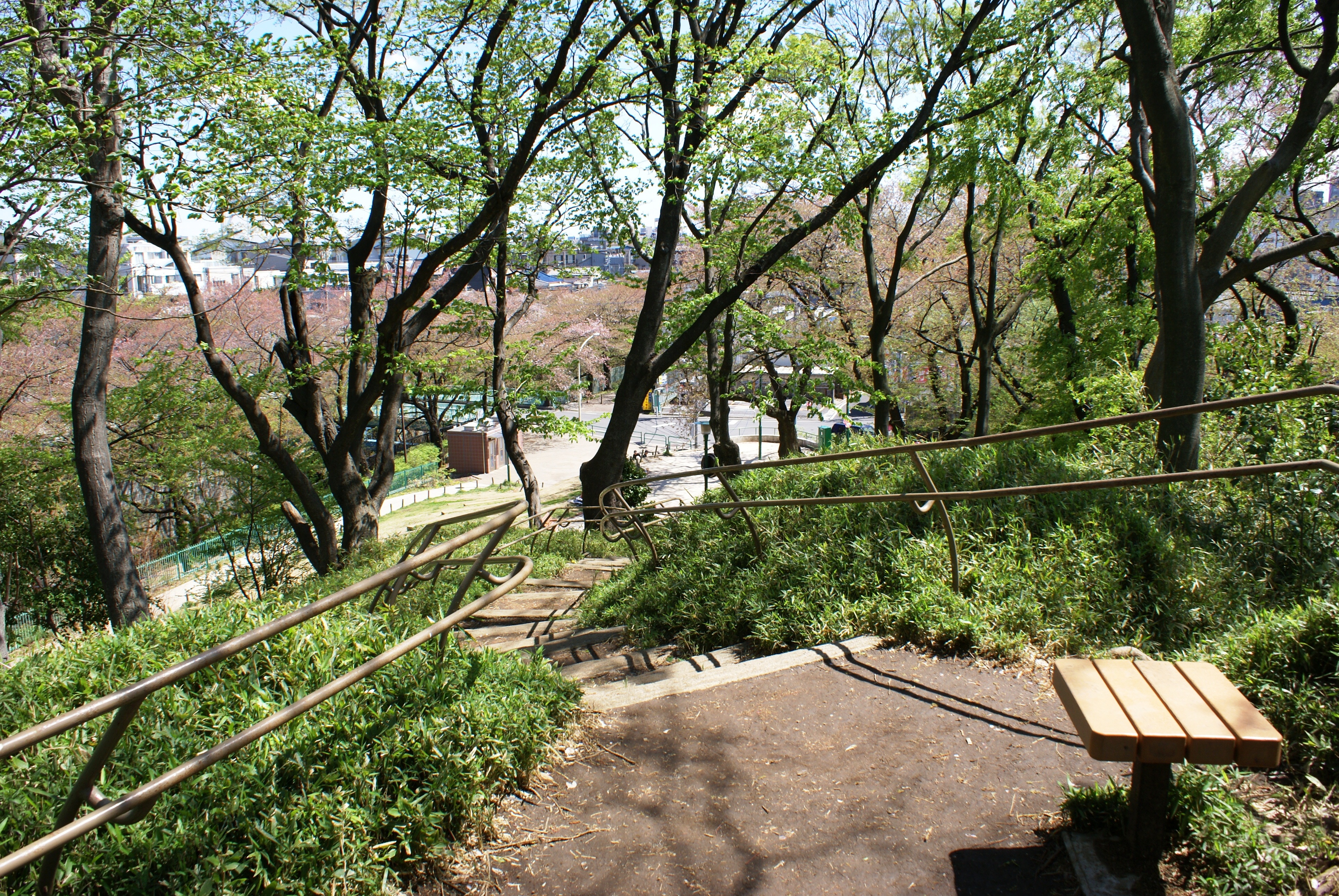 加賀藩下屋敷跡